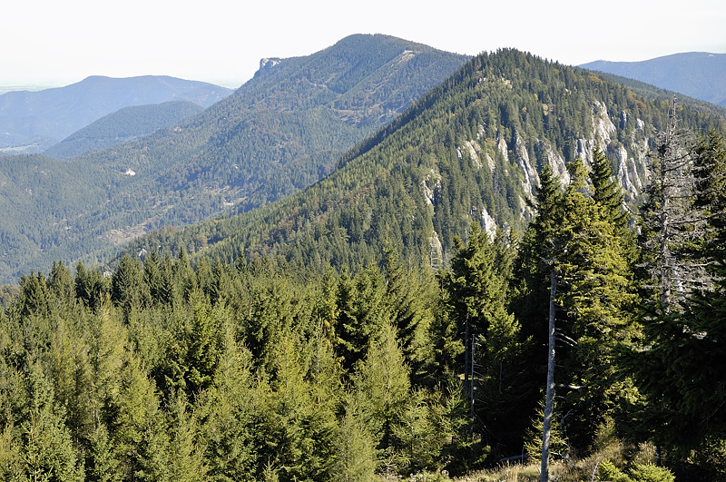 Schober (1213)